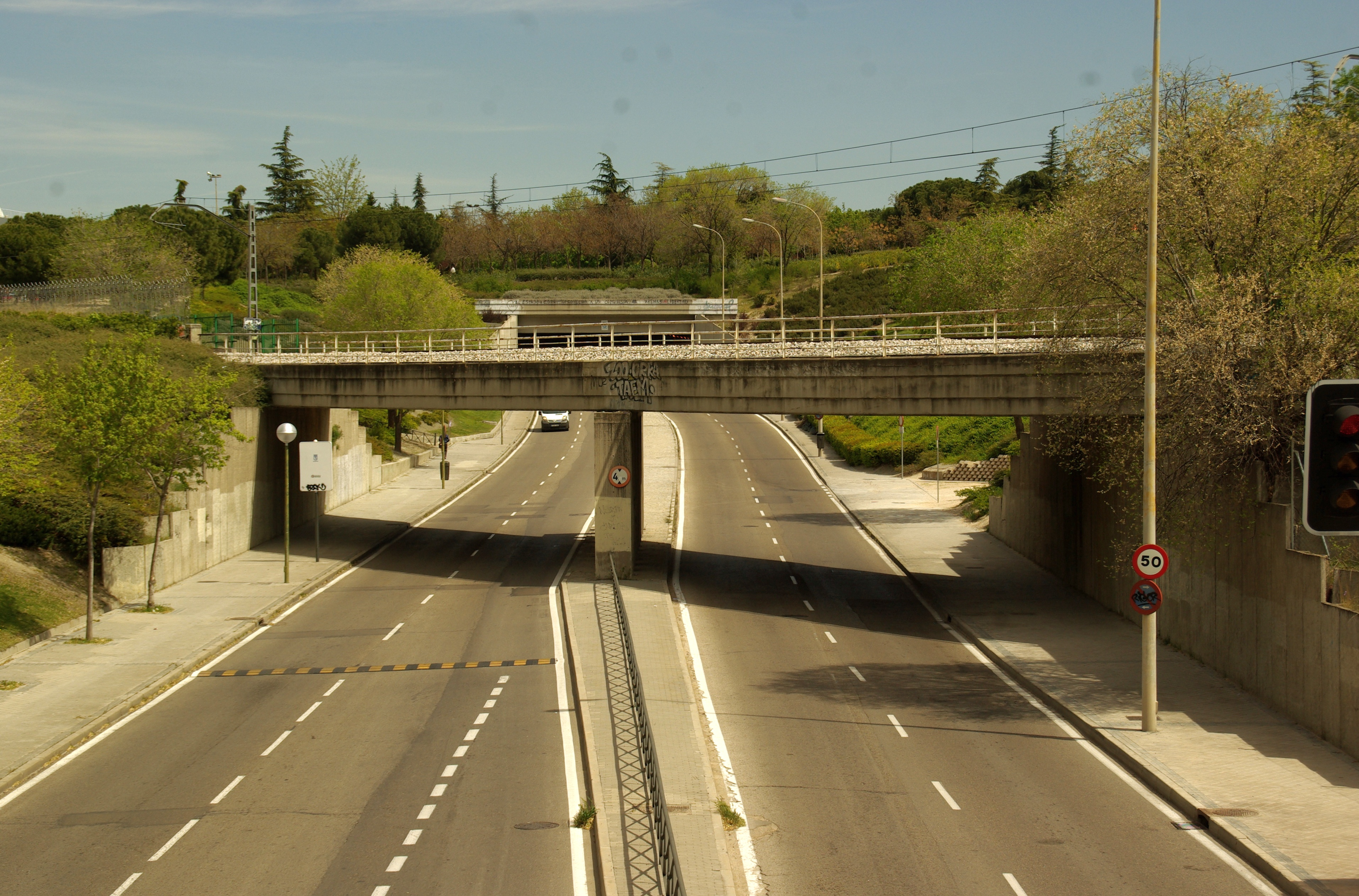 Puente ferroviario de la línea 916 de Adif de Delicias a Madrid-Santa Catalina sobre la avenida del Planetario (Madrid).